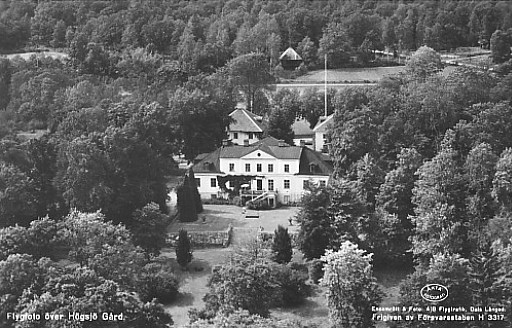 Högsjögård, Vingåker